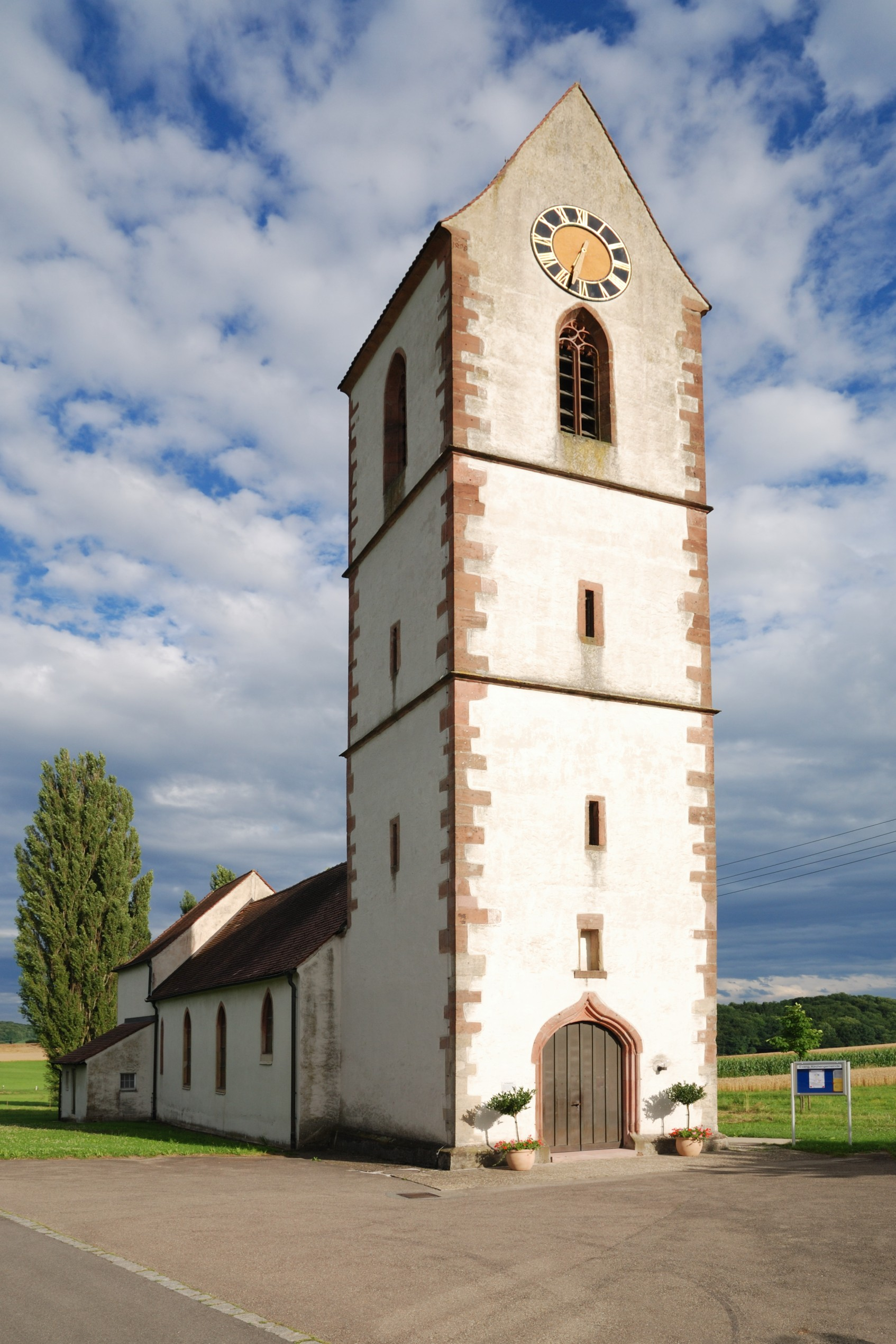 Peterskirche in Blansingen, auf dem roten Stein links der Turmuhr ist die Jahreszahl 1498 zu erkennen